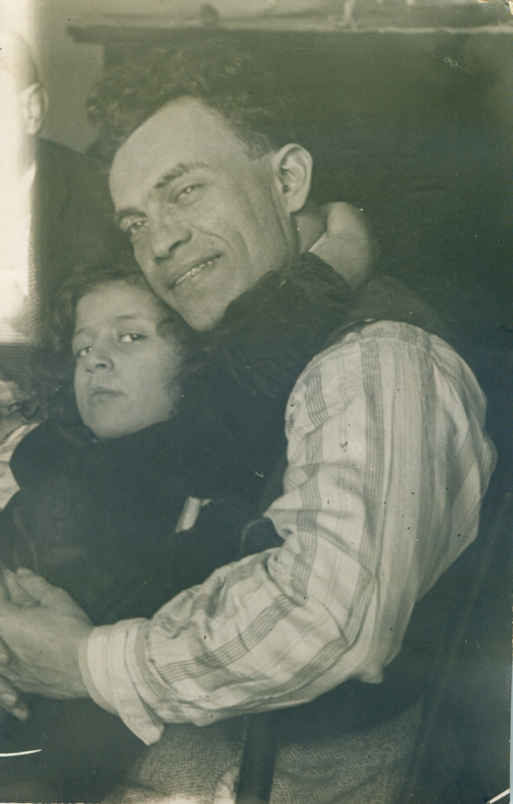 Luciana Viviani a quattro anni in braccio al padre Raffaele Viviani